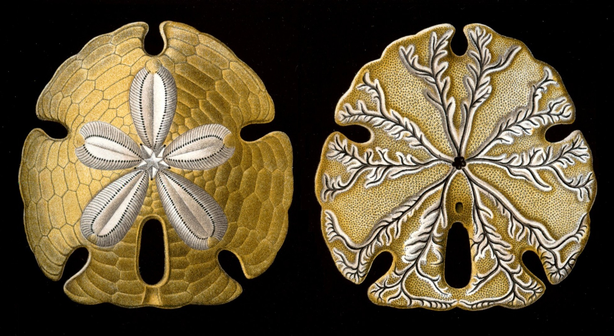 Encope emarginata (Leske) = shell without spines from above Encope emarginata (Leske) = shell without spines from below